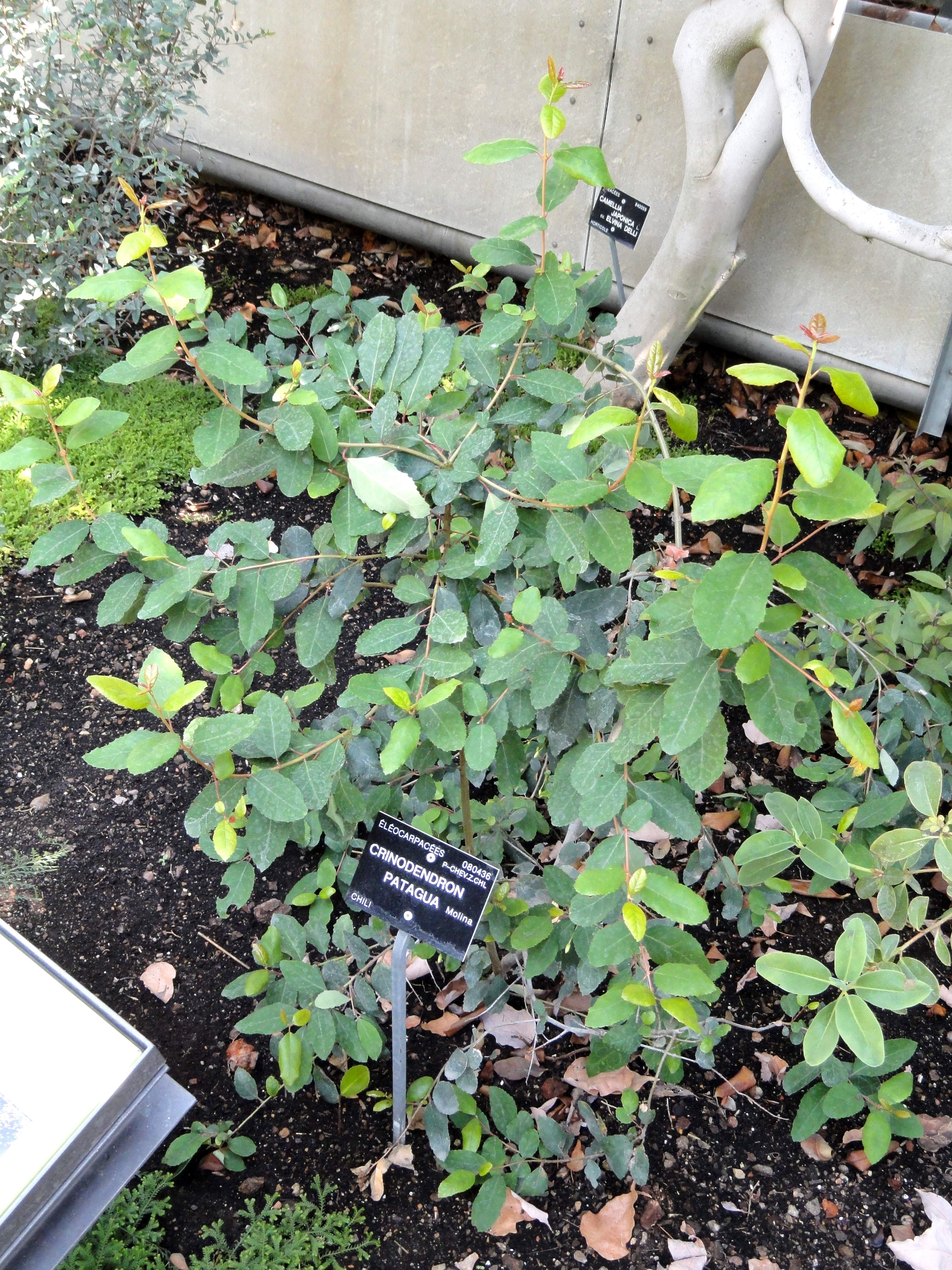 Crinodendron patagua specimen in the Jardin Botanique de Lyon, Parc de la Tête d'Or, Lyon, France.